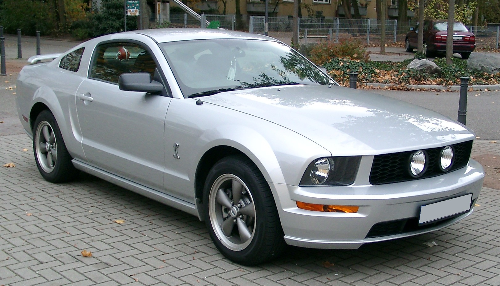 Ford Mustang V